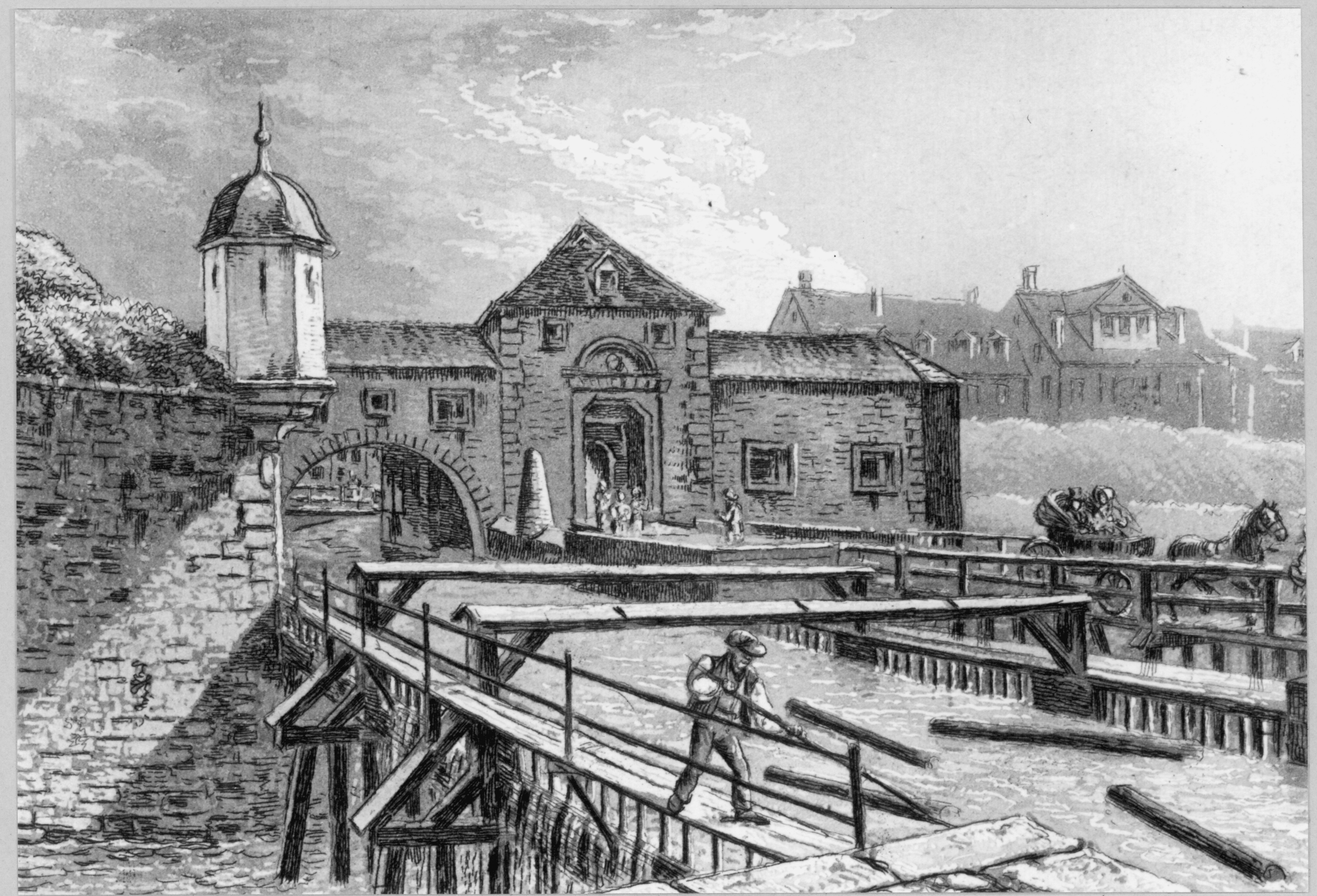 Flösser am Sihlkanal vor der Sihlporte, Zürich, Schweiz, 1840: Talacker 41. Der Sihlkanal wurde an dieser Stelle mit einem Aquädukt über die Sihl geführt und wurde neben der Sihlporte durch die Stadtbefestigung geführt